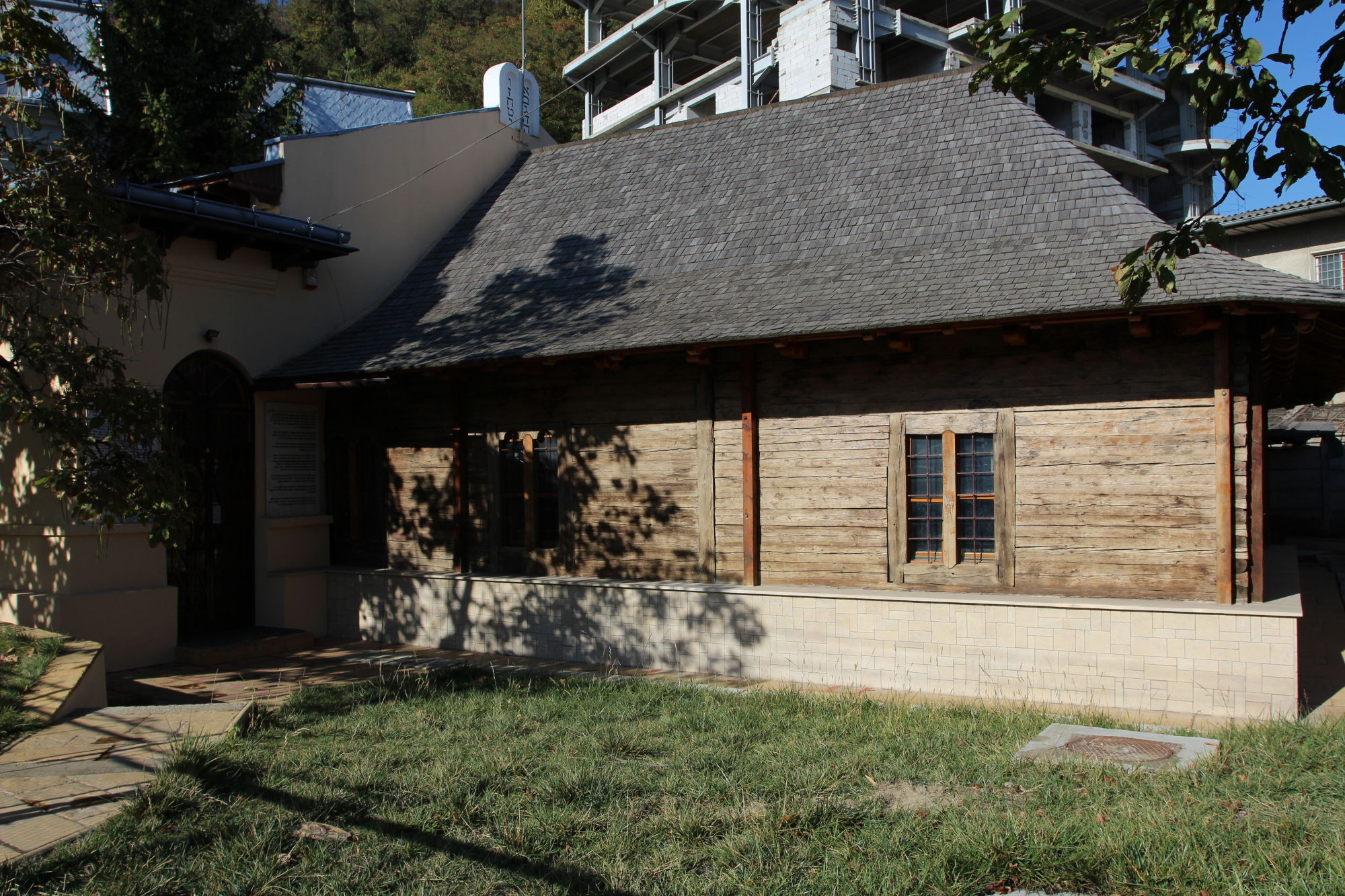 Sinagogă